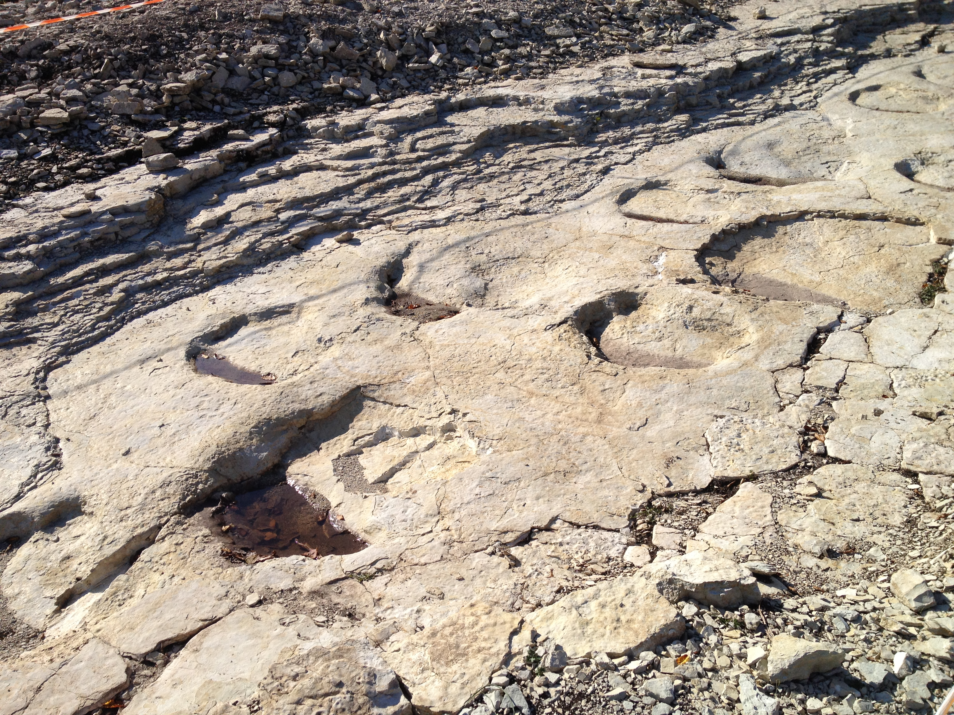 Empreintes fossiles de sauropodes sur la commune de Plagne (Ain), sur le site de «Dinoplagne». (Paléoichnologie)